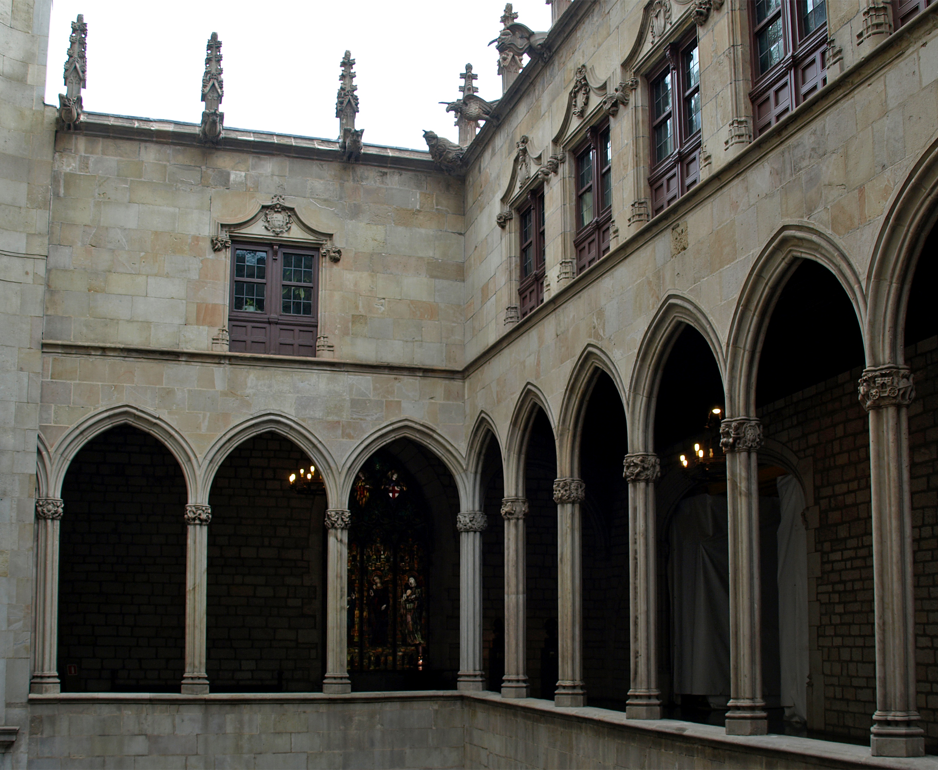 Galeria Gòtica (Ajuntament de Barcelona)